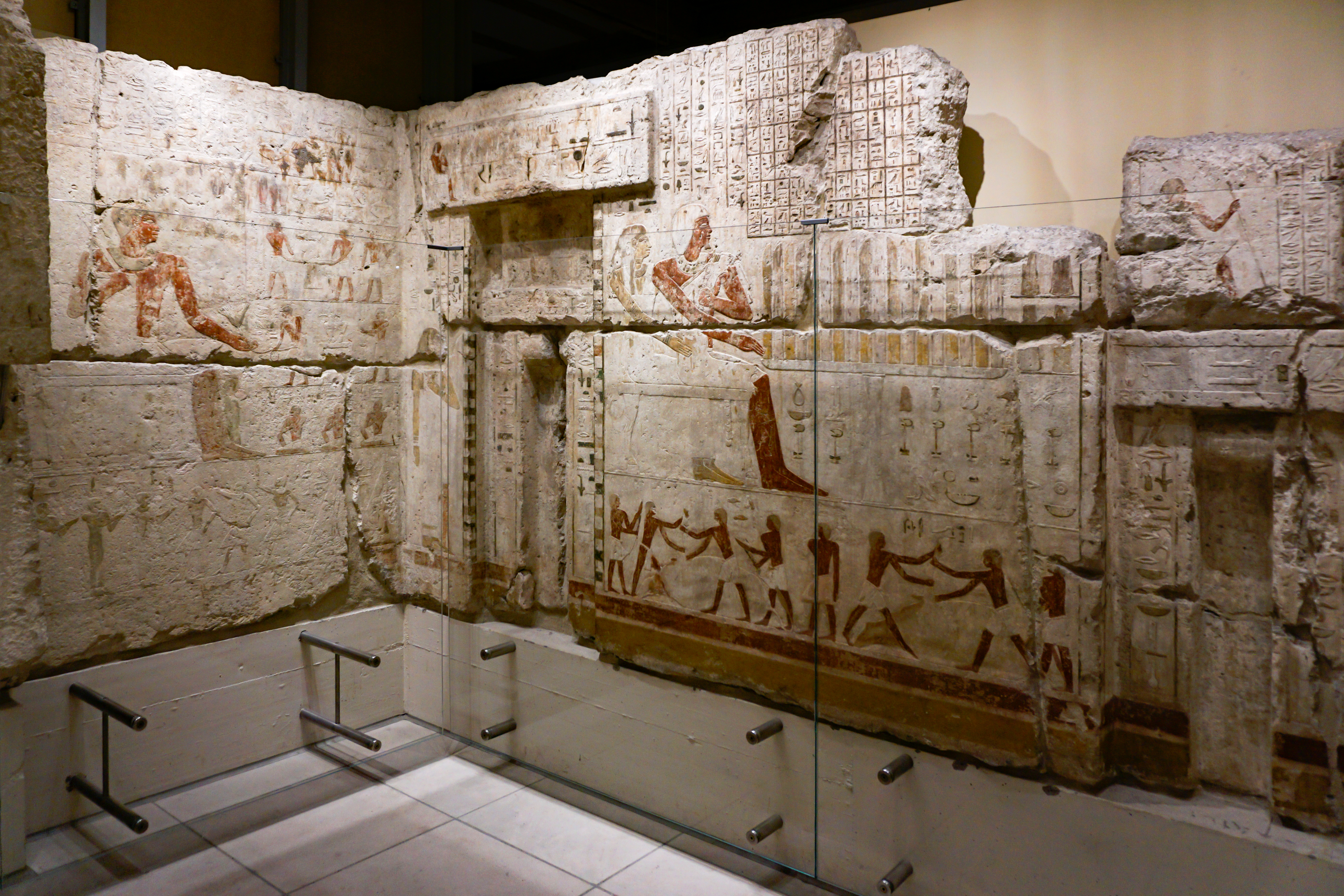 MUT: Museum der Universität Tübingen - Alte Kulturen - Sammlungen im Schloss Hohentübingen, Ägyptische Sammlungen: Opferkammer des Seschemnofer III.